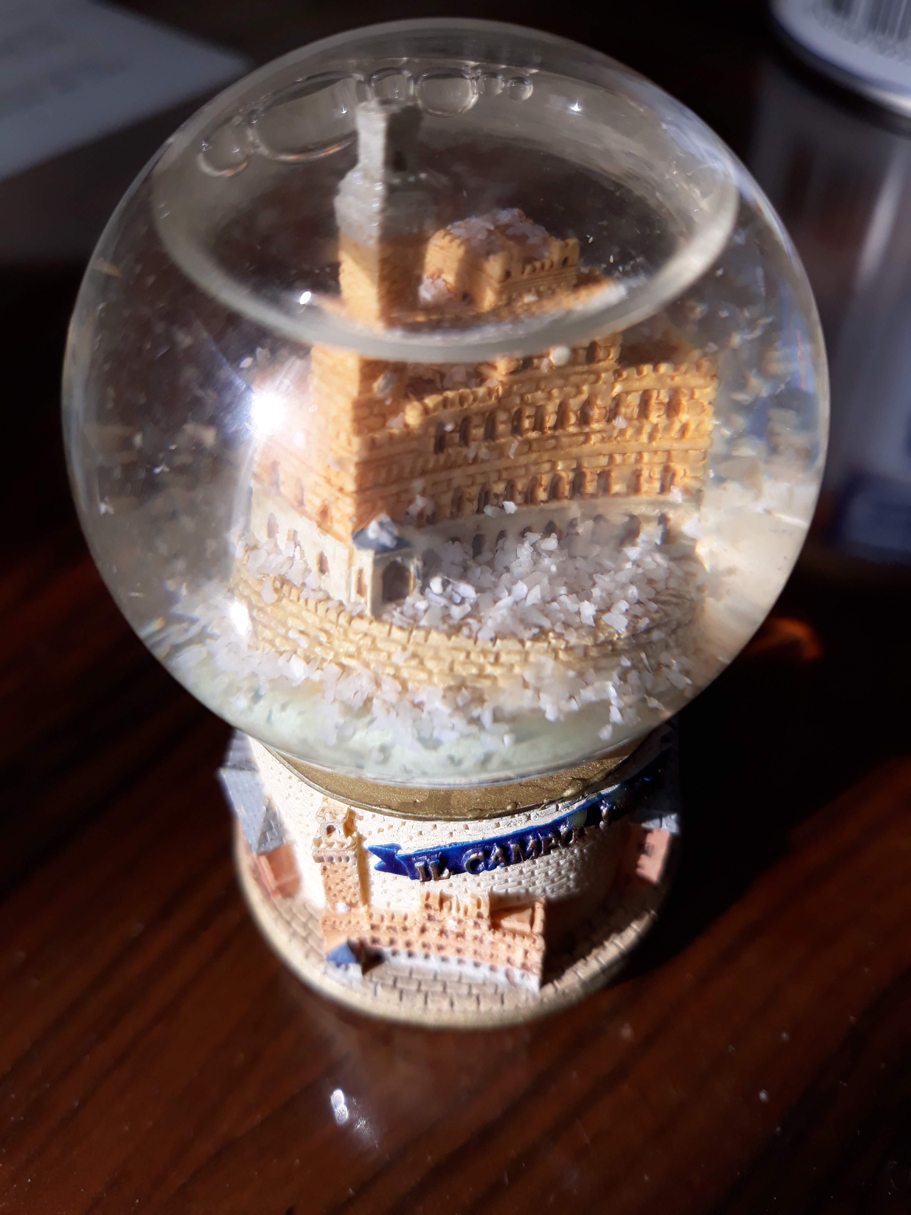 Bola de nieve fabricada en Chiná